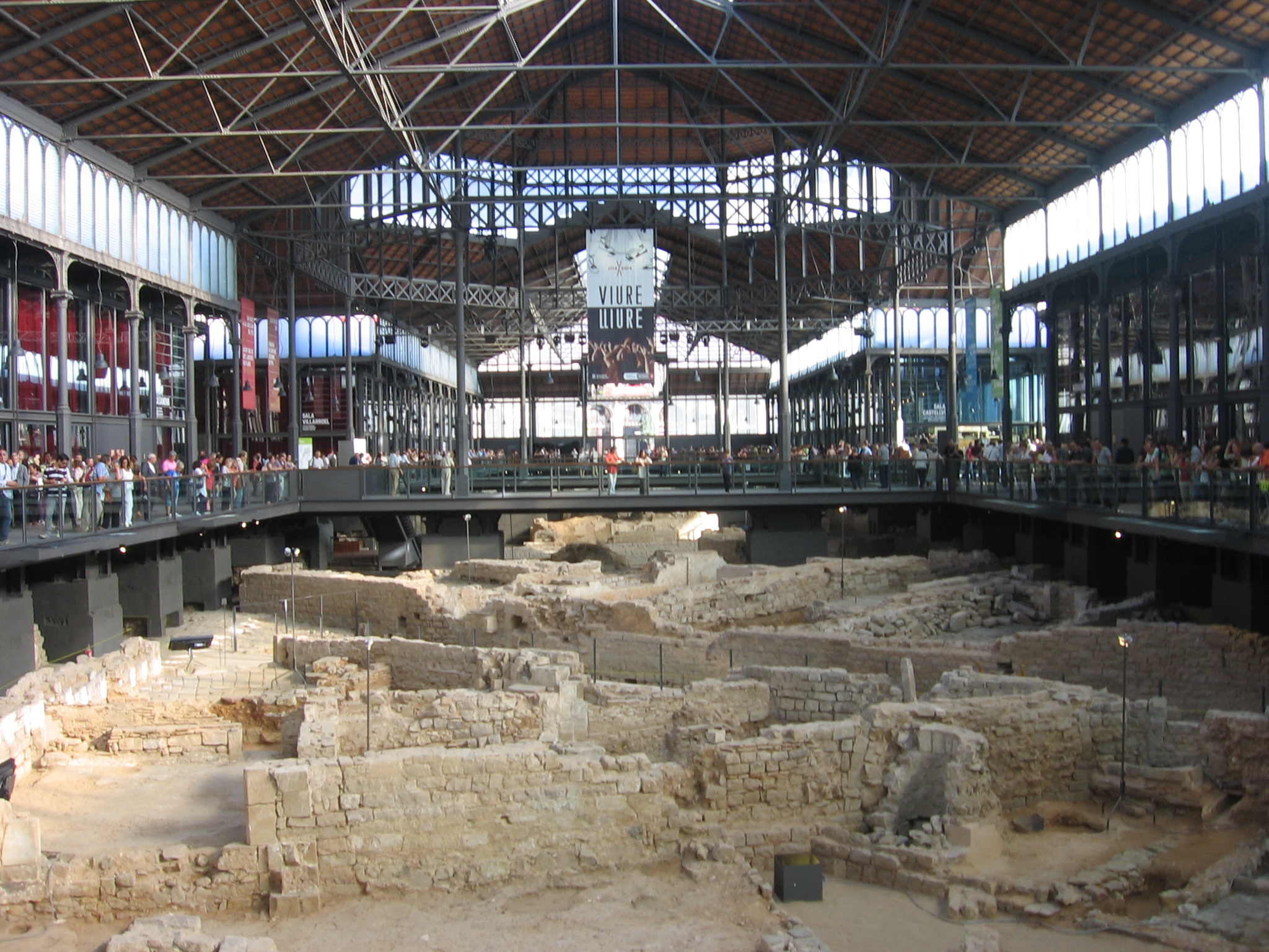 Interior del Centro Cultural del Born.